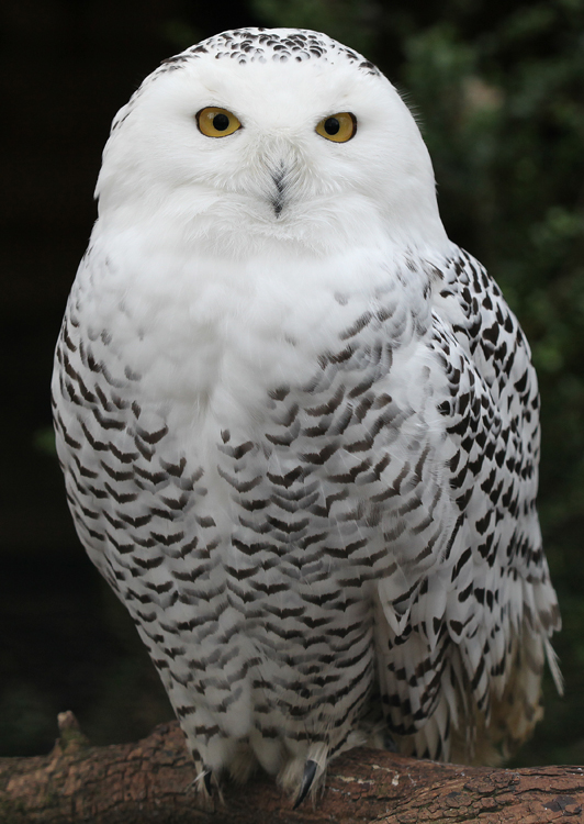 Snowy owl.